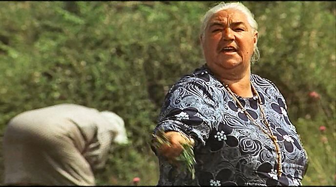 Screenshot del film Trastevere (1971) di Fausto Tozzi